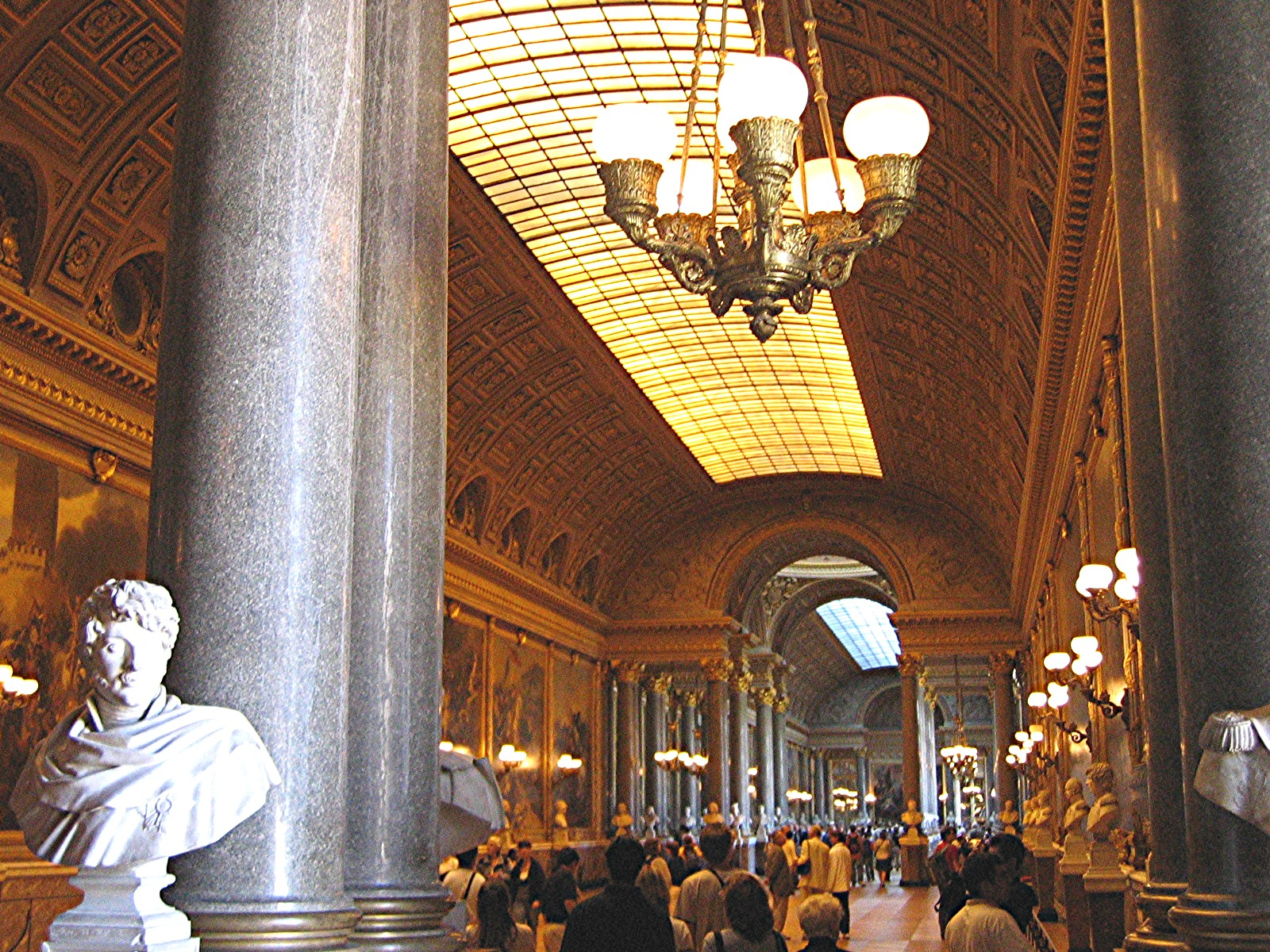 Galerie des batailles, château de Versailles. Image personnelle prise par l'utilisateur Urban, septembre 2004, GFDL Urban Septembre 2004 Catégorie:Versailles